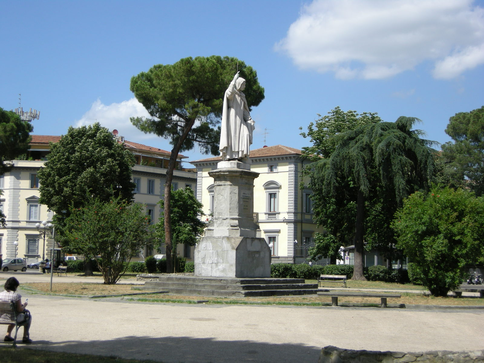 Piazza Savonarola in Florence, Italy.